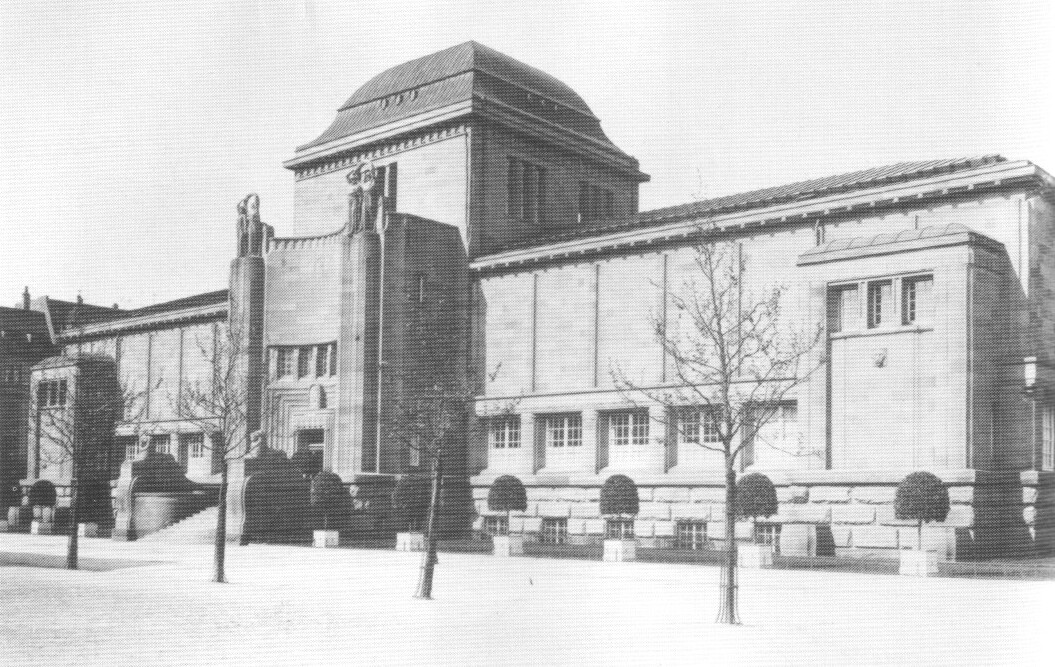 Mannheim, Kunsthalle, Haupteingang Moltkestraße, ca. 1918